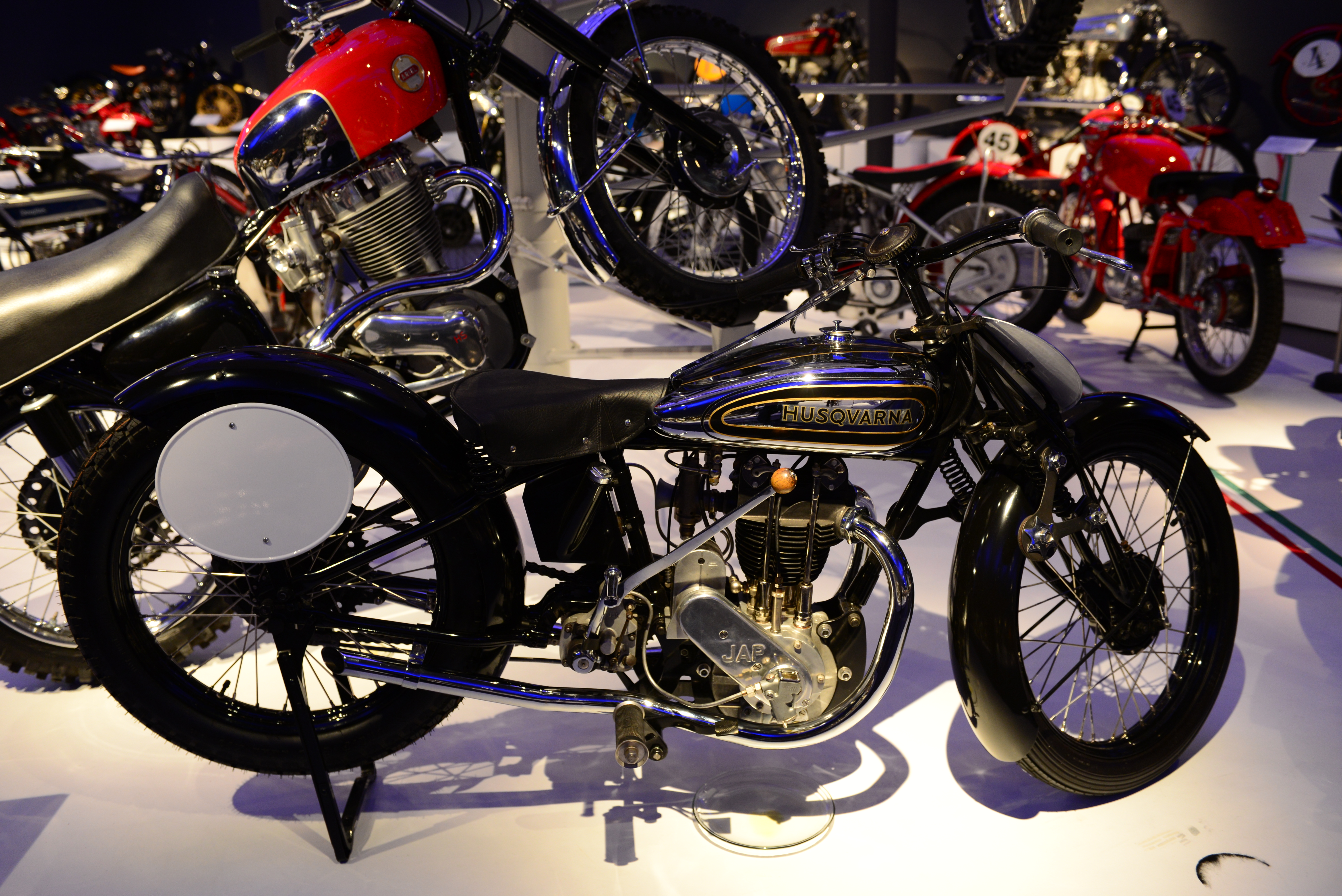 Denna Husqvarna med JAP 250 cc racermotor är den ena av två bevarade. Den tävlade dock aldrig utan användes av en stockholmare som bruks-MC i 25 år. Sedan övertogs den av MC-museet i Hedemora och därefter av Gert-Ove Johansson som återställde den i sitt urspringliga racerskick